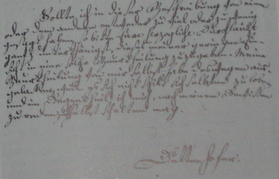 Schluss einer Beurteilung, die Karl August Friedrich von Duttenhofer in seiner Zeit auf der Hohen Karlsschule über seine Mitschüler und sich selbst schreiben musste